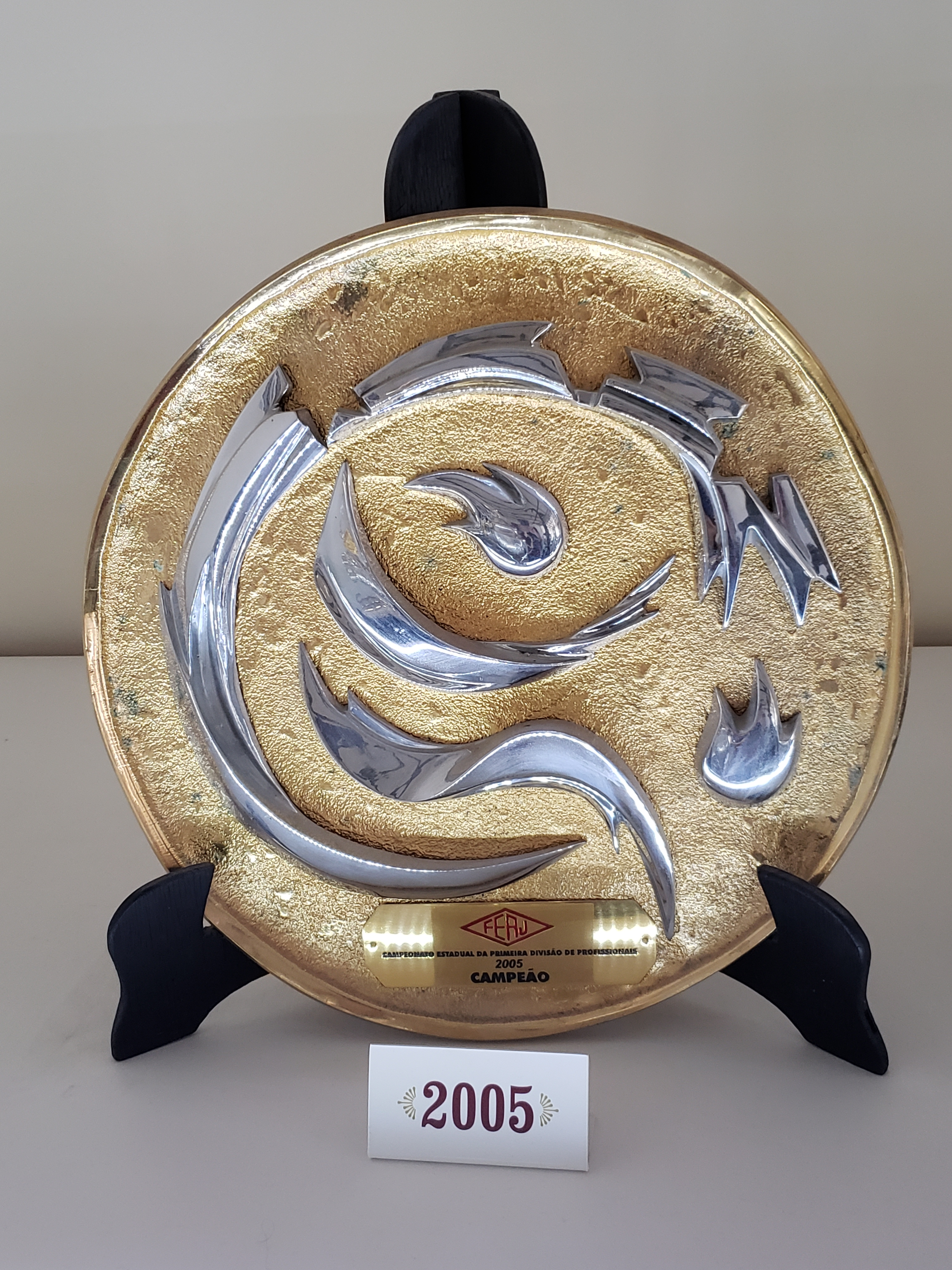 Taça do Campeonato Carioca de Futebol de 2005 conquistada pelo Fluminense Football Club.